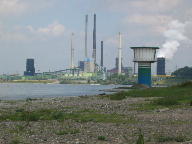 Rheinufer im Norden Duisburgs mit Industriekulisse.